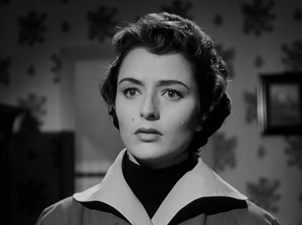 Screenshot dal film Ai margini della metropoli (1953)